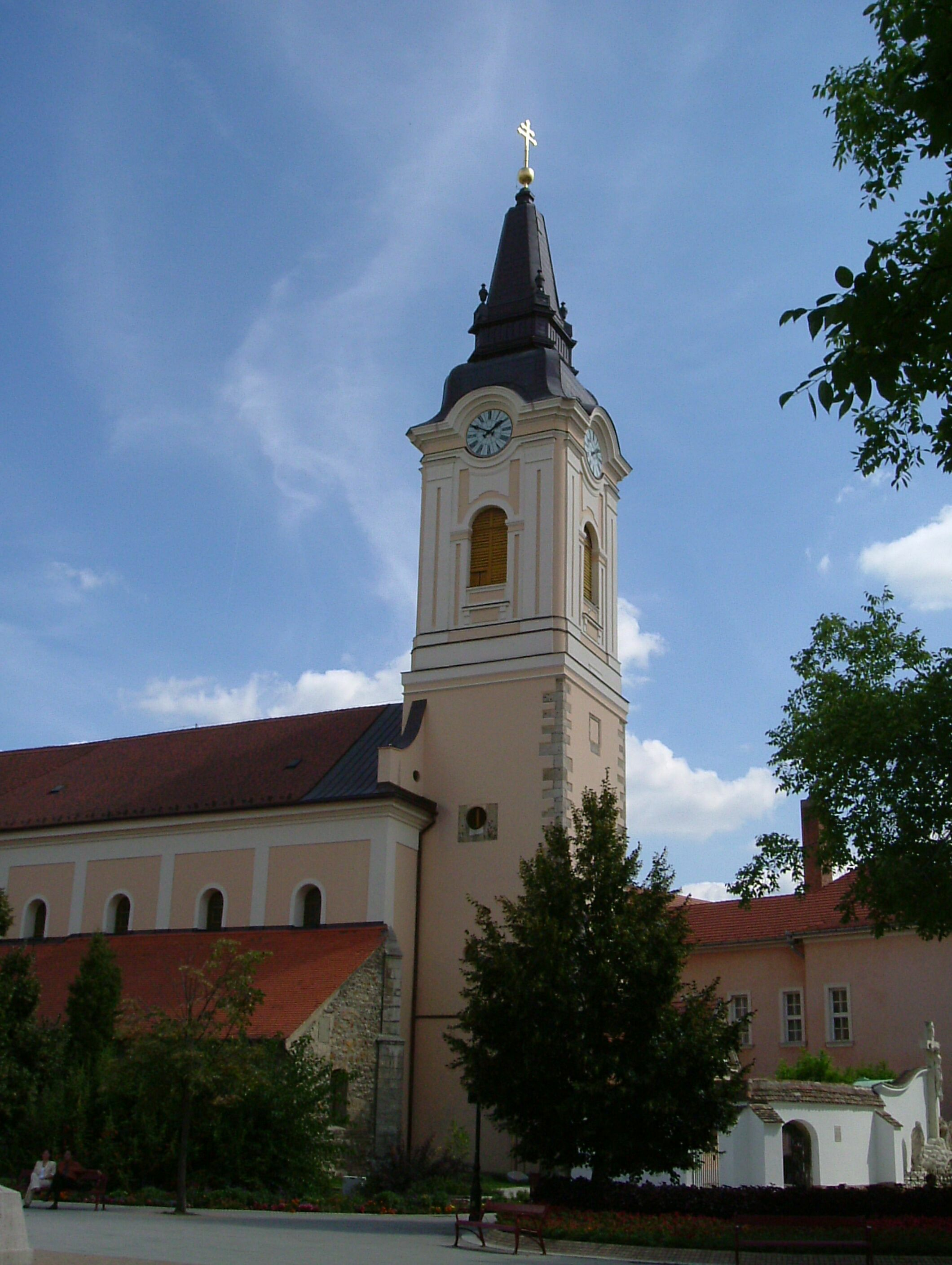 Szent Miklós-templom (Kecskemét)